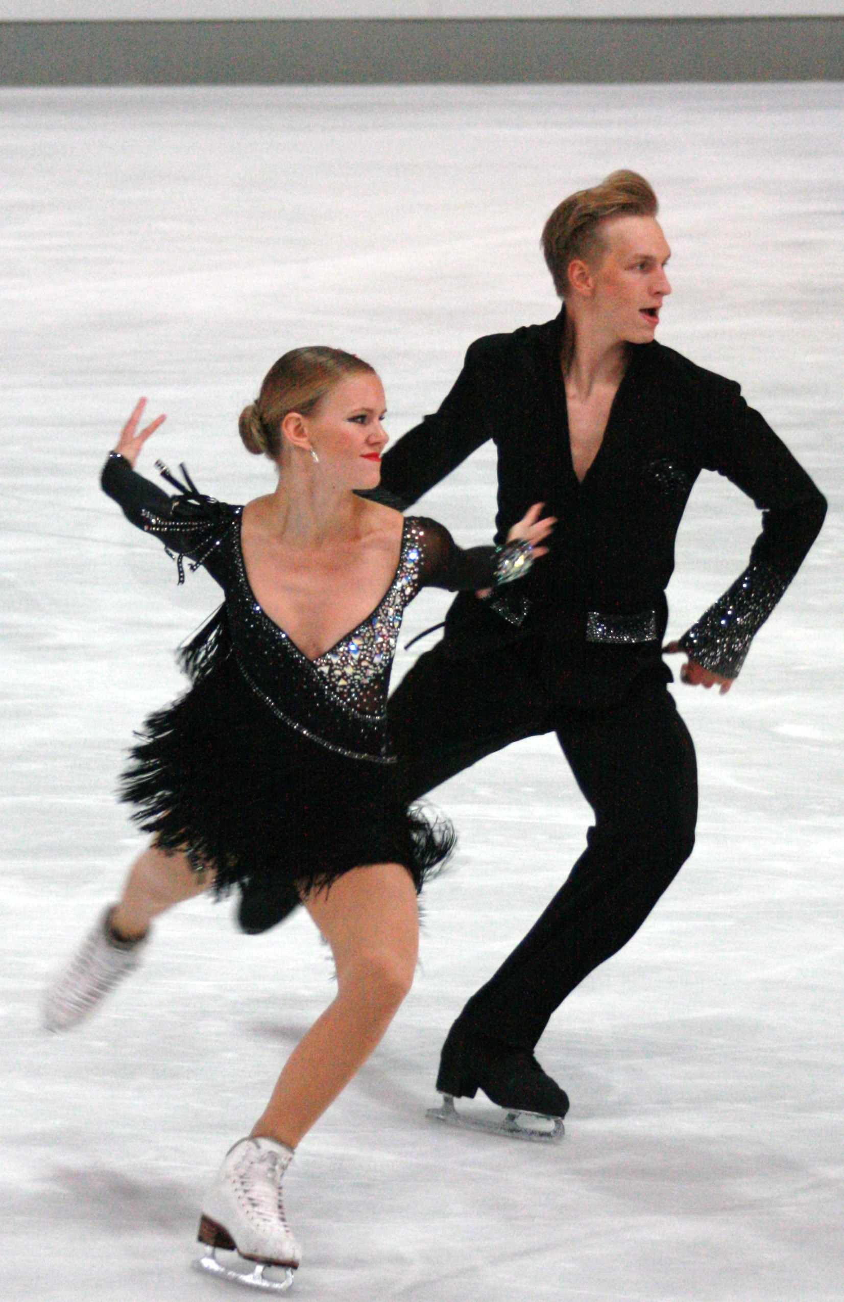 Габриэла Кубова и Матей Новак (Чехия) на 2013 Nebelhorn Trophy